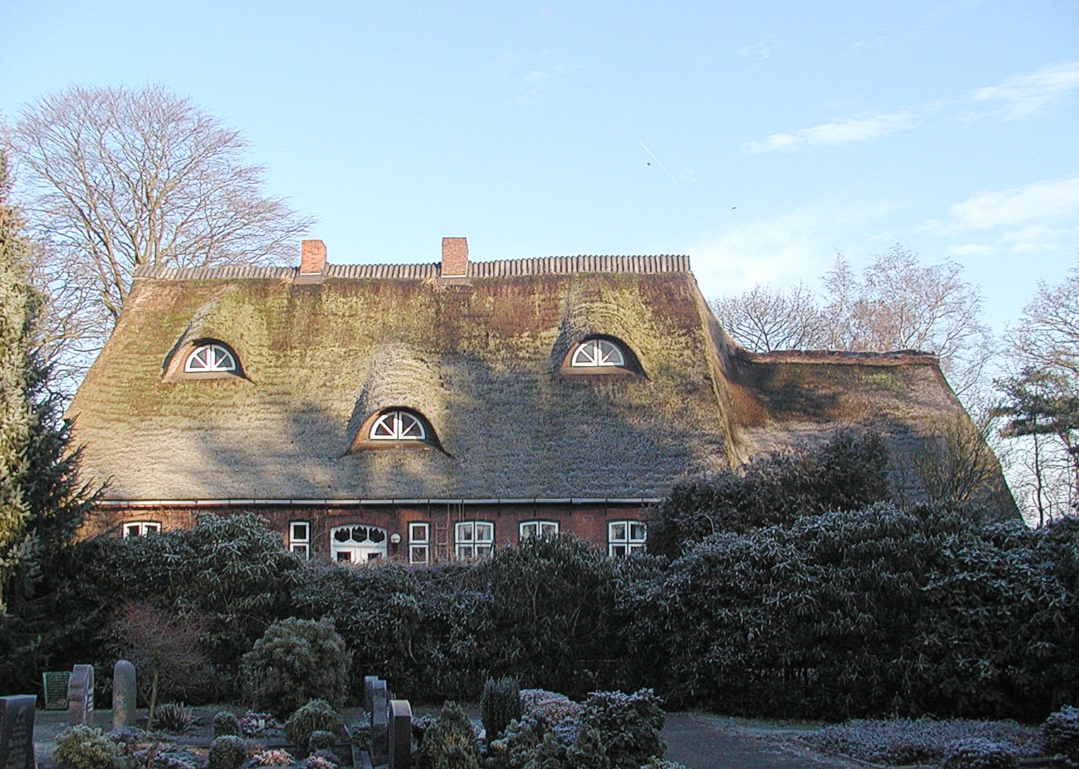 Das ehemalige Pfarrhaus in Oppeln